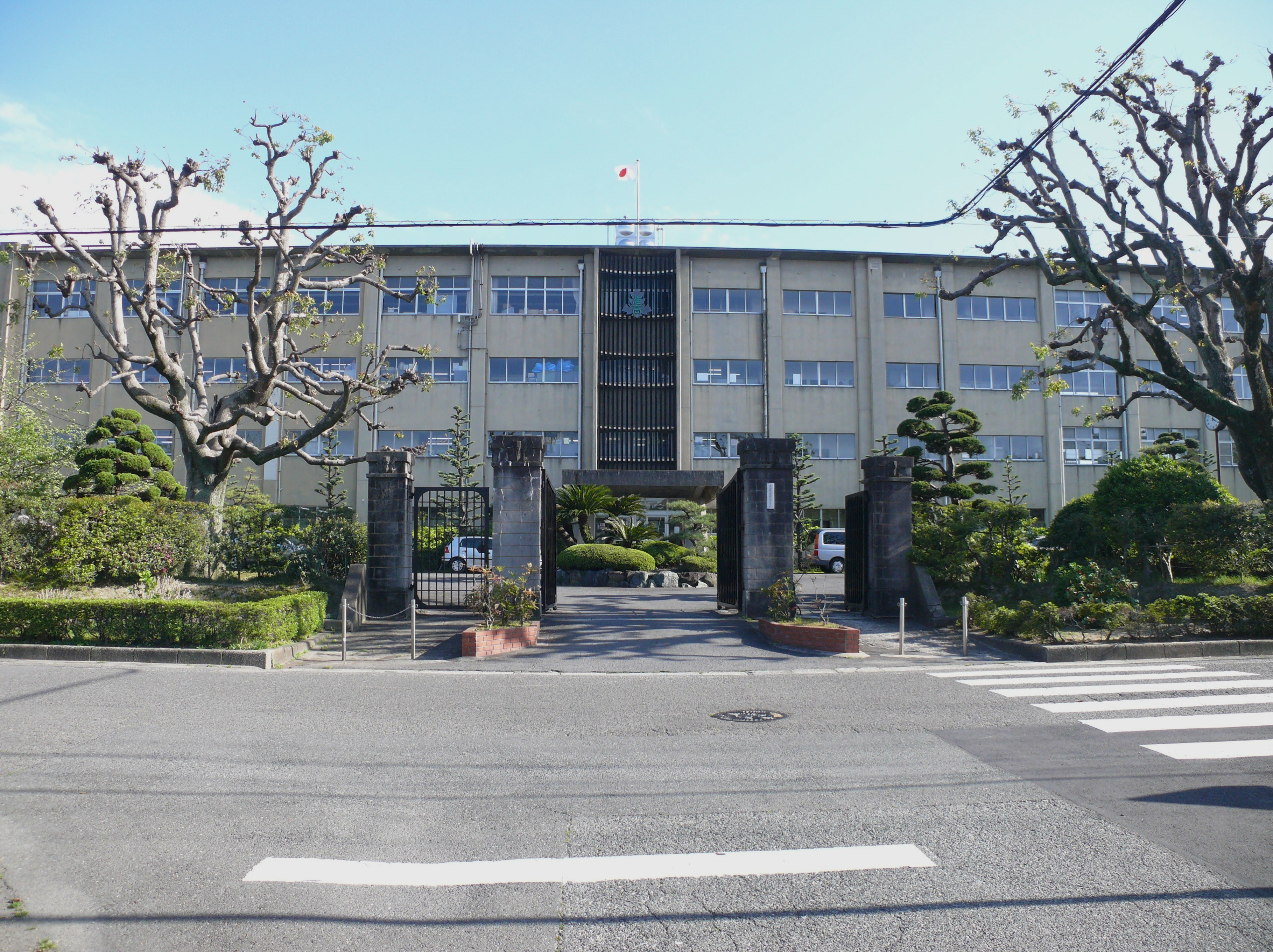 愛知県立惟信高等学校の正門